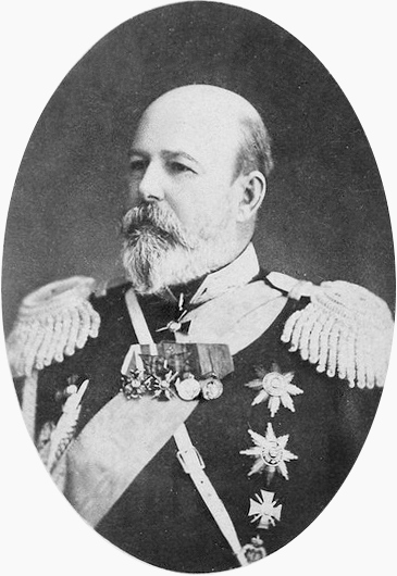 Grigory Golitsyn